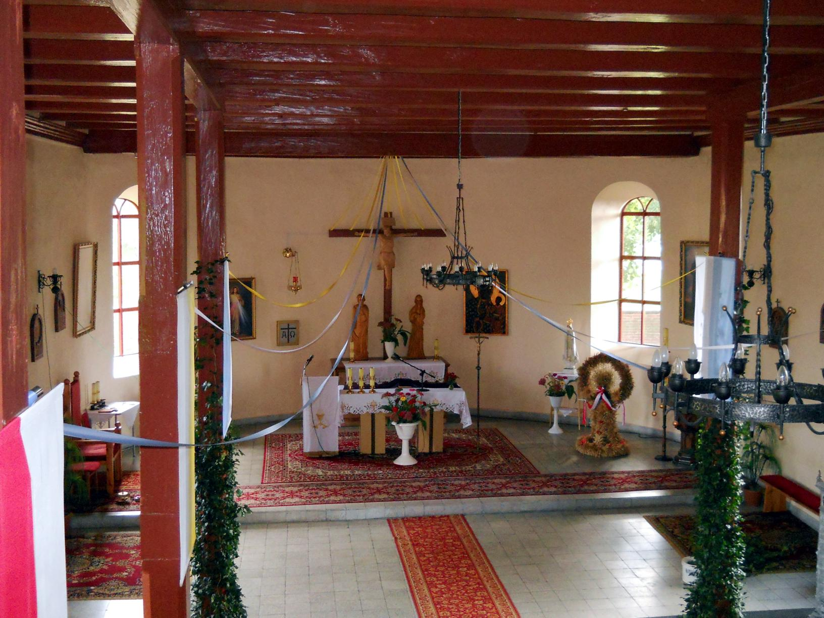 Kościół w Wojcieszycach. Wnętrze widziane z empory.